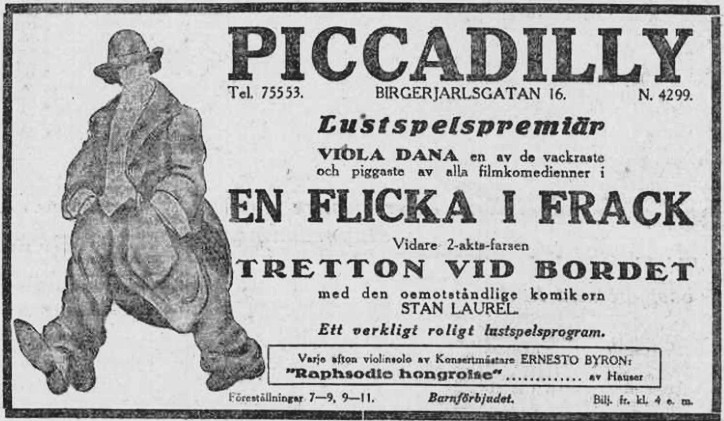 Biograf Piccadilly ger "En flicka i frack" och "Tretton vid bordet"